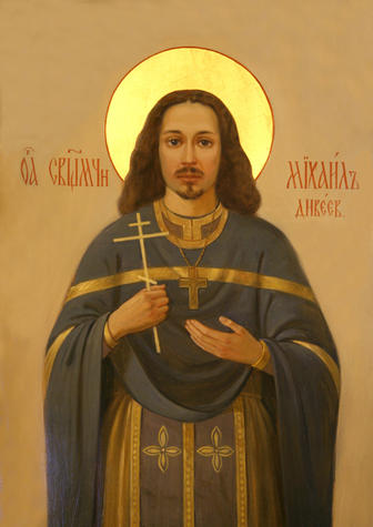 Официальный сайт Свято-Троицкого Серафимо-Дивеевского монастыря